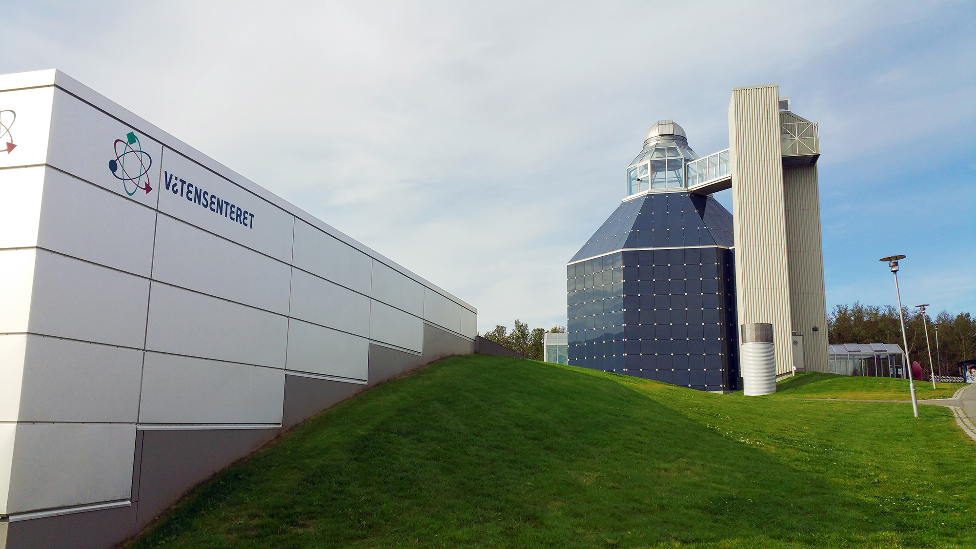 Nordnorsk vitensenter sett fra nord. Inngangen er sør for bygget